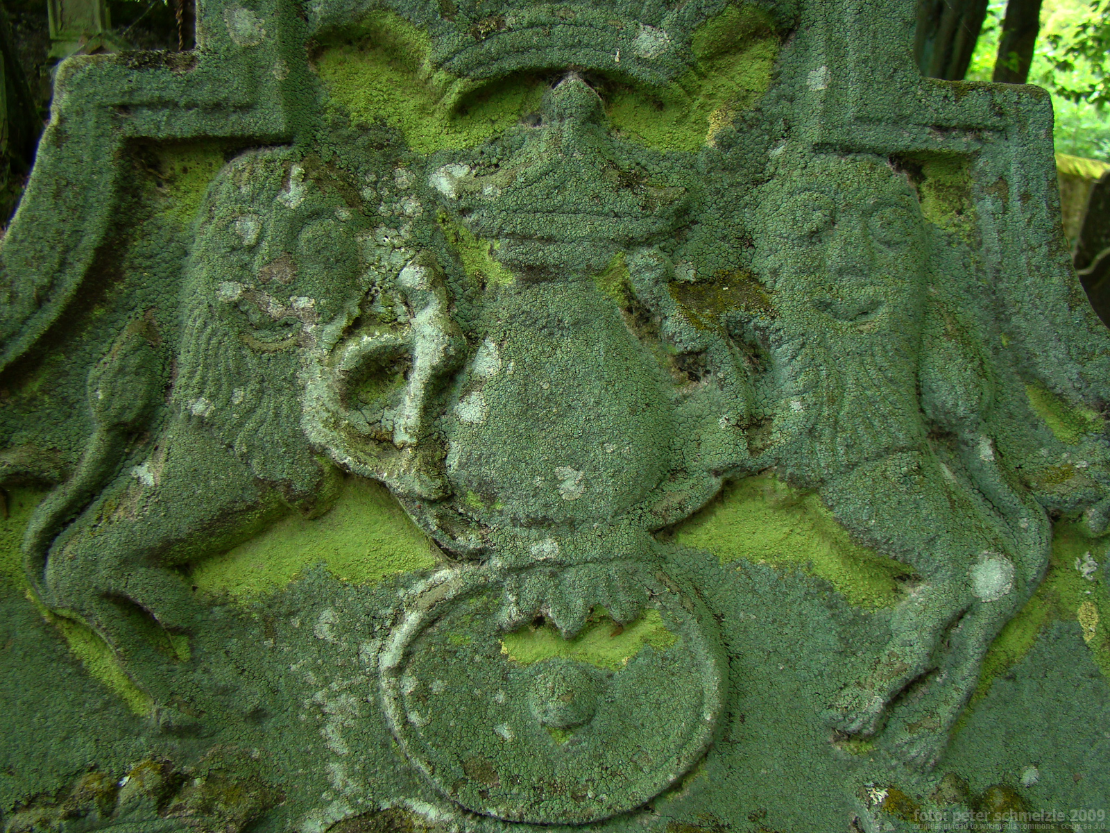 Judenfriedhof in Bad Rappenau-Heinsheim